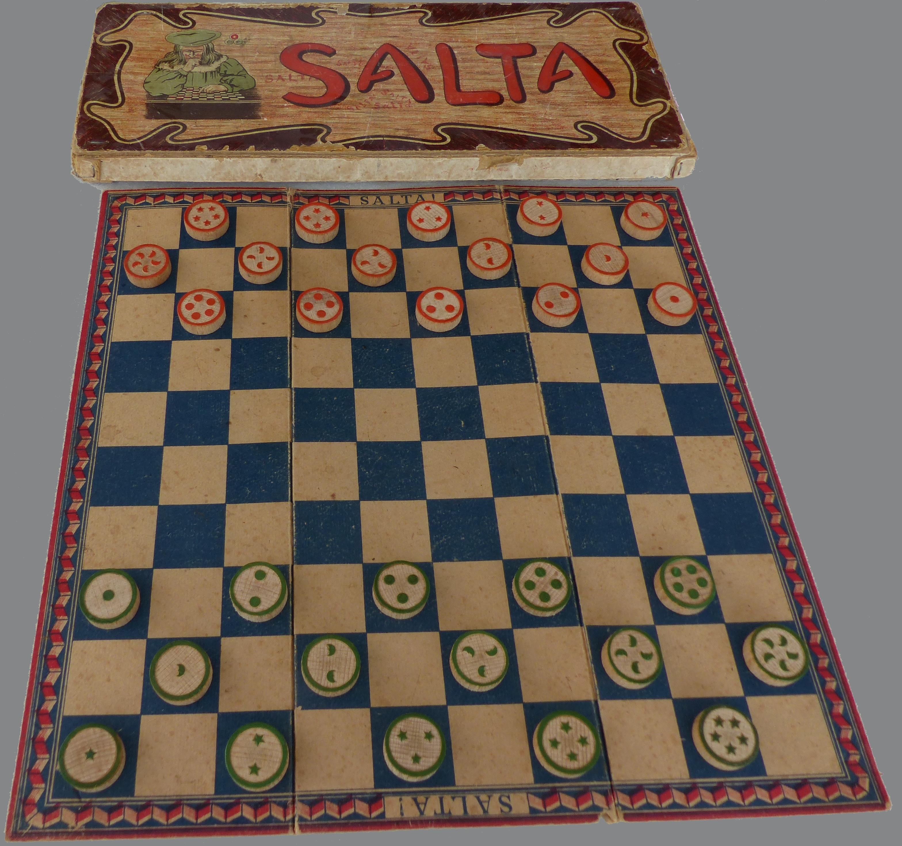 Salta: Brett mit Anfangsposition und Spielschachtel